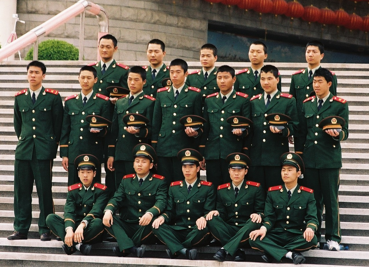 Groupe de Gendarmerie (Police armée) soldats à Shanghai